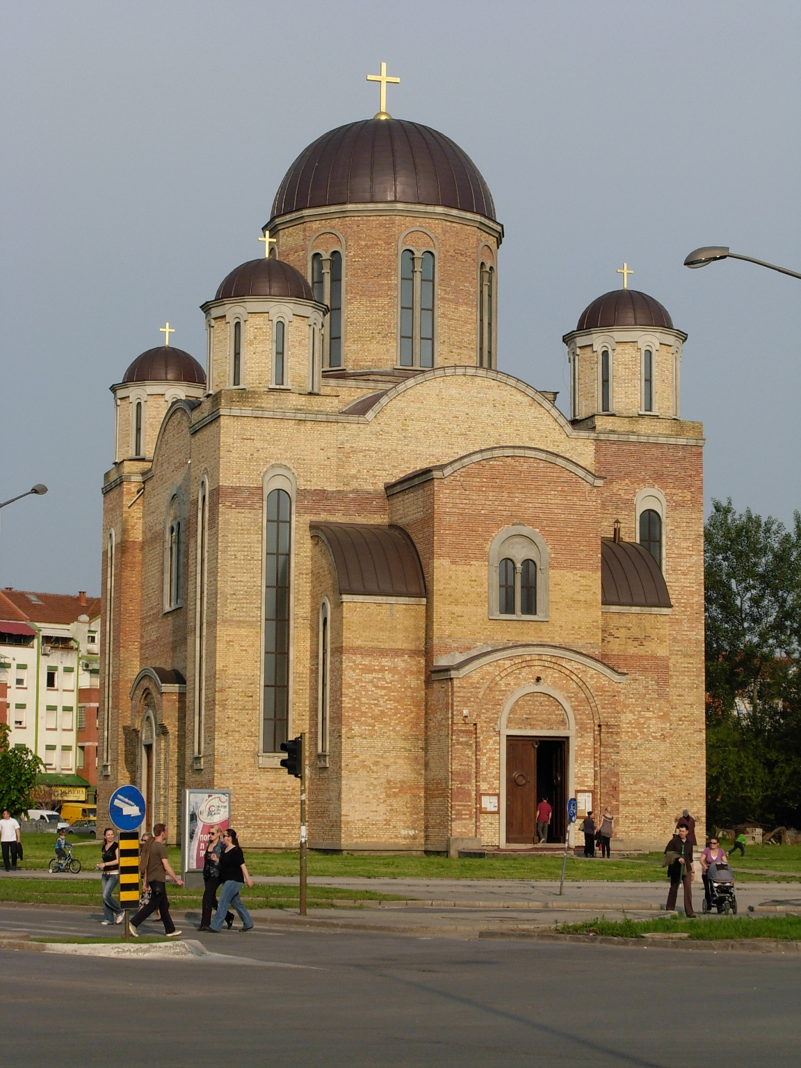 Hram Svetog Save u Novom Sadu.